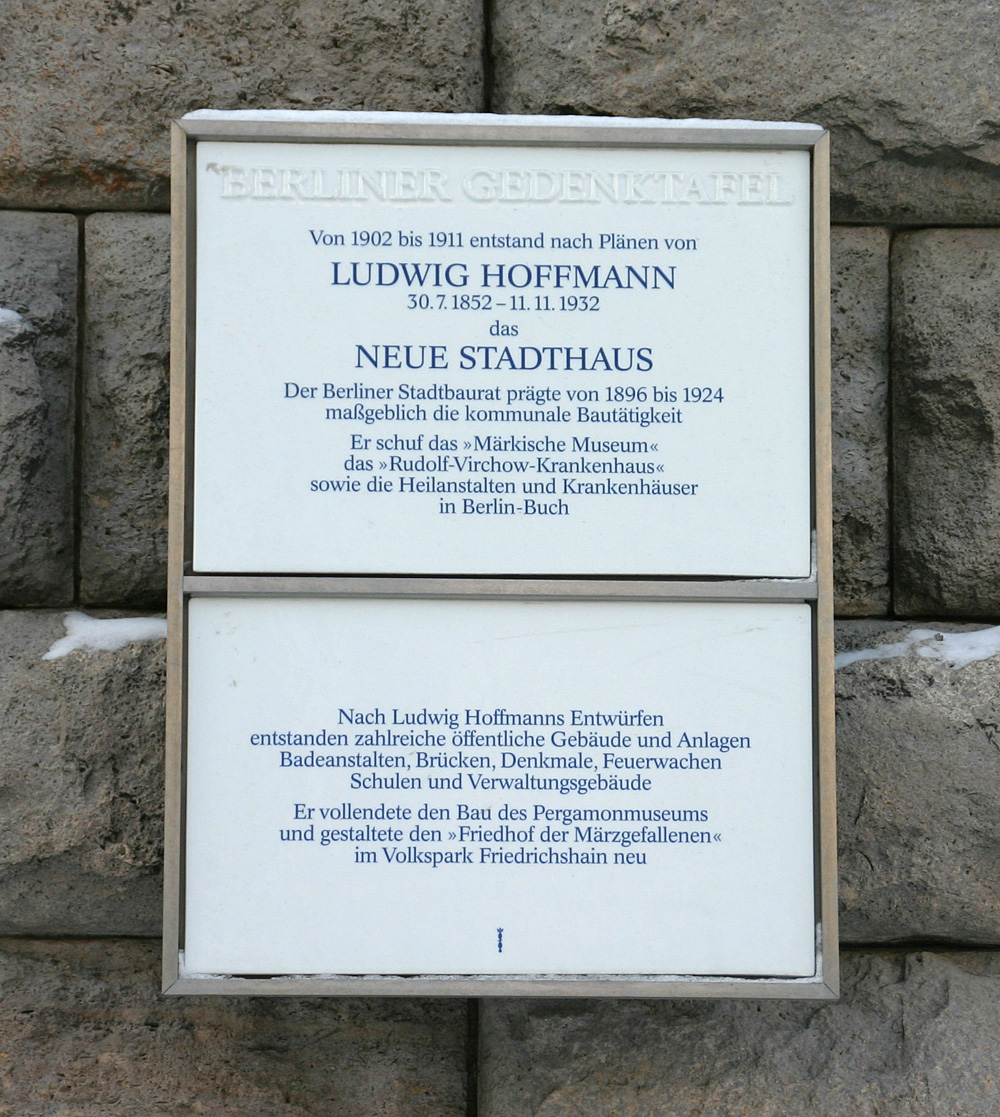 Berlin, Stadthaus, info plate at Klosterstraße author: Elke Wetzig (elya) date: 2005-12-30